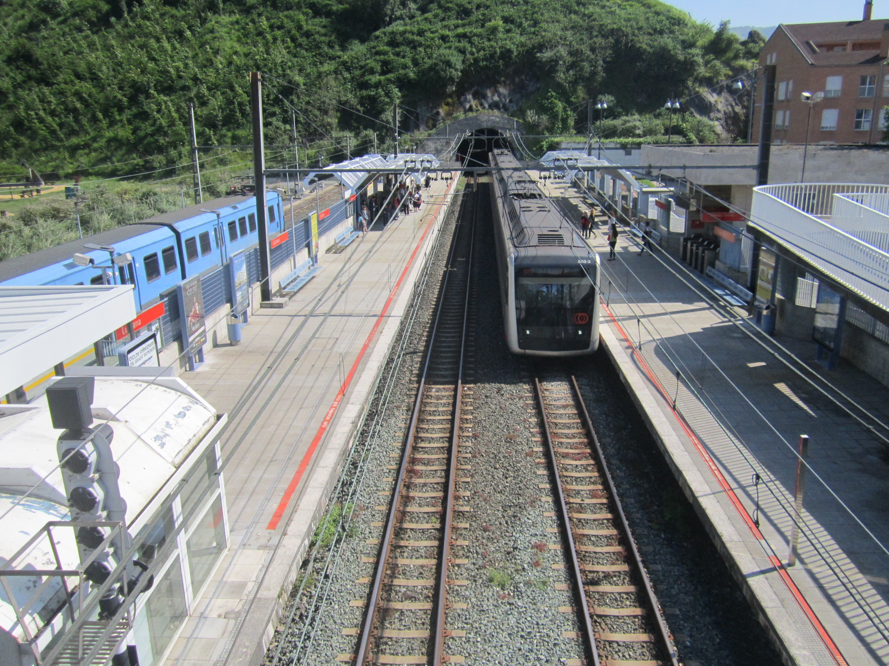 Unidades de Euskotren (izquierda) y Metro Bilbao (derecha) en la estación de Lutxana (Erandio)